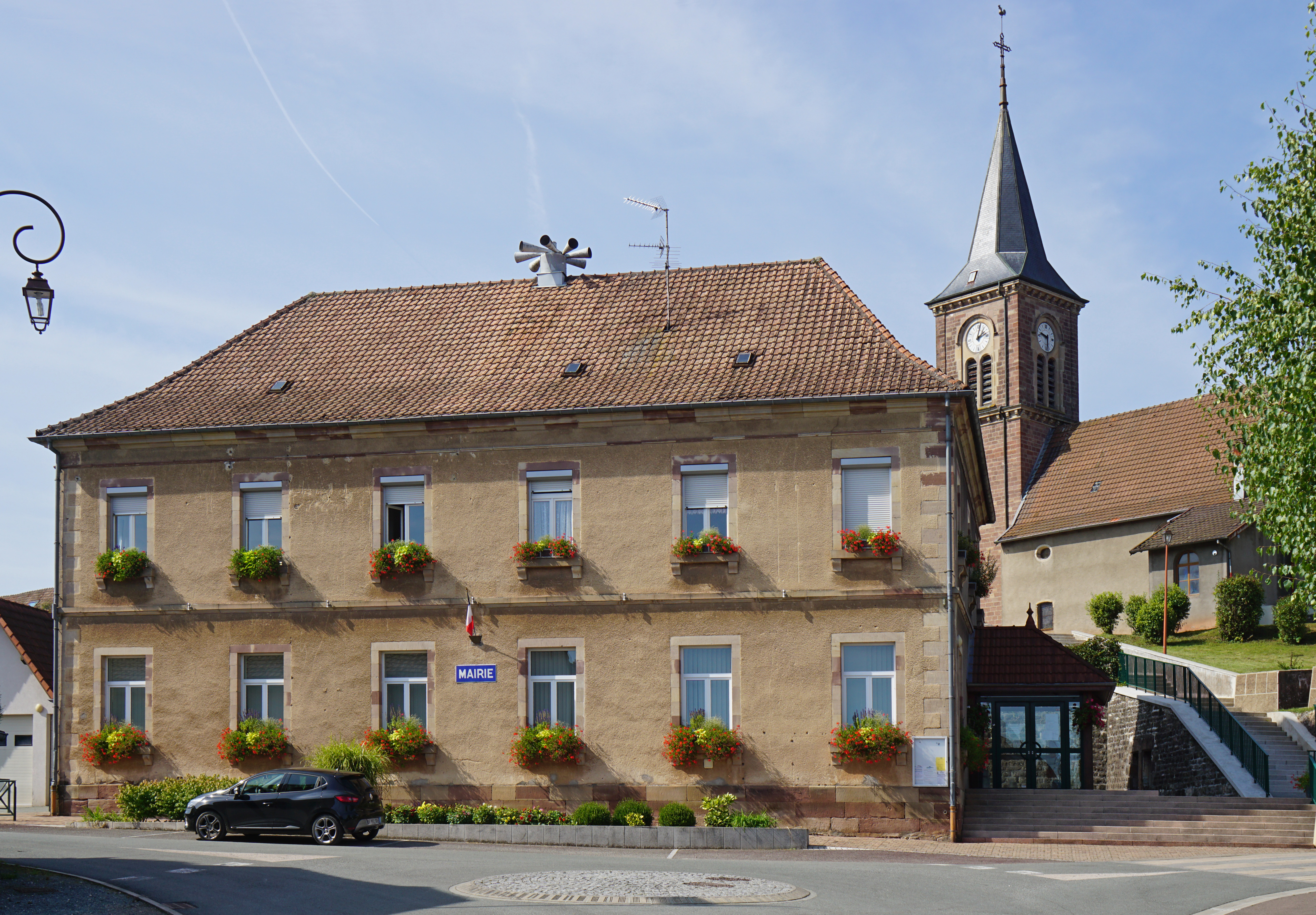 La mairie de Châlonvillars et l'église Sainte-Radegonde.